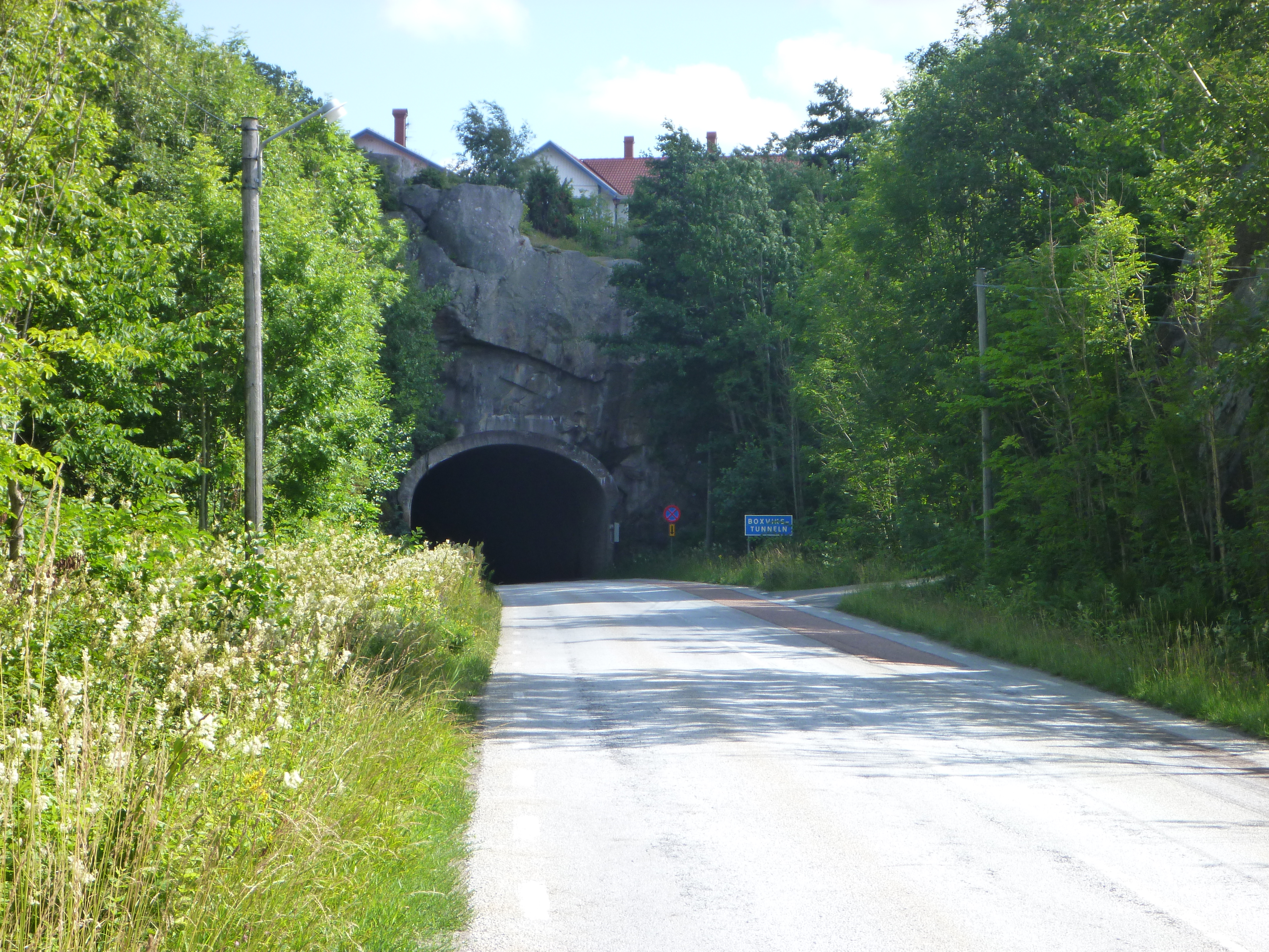 Boxvikstunneln från norr